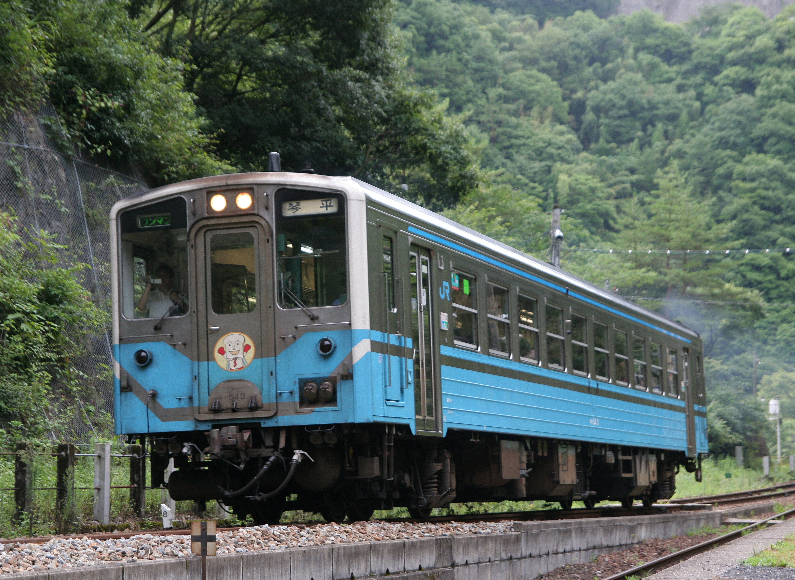 JR四国 キハ54形気動車3 坪尻駅